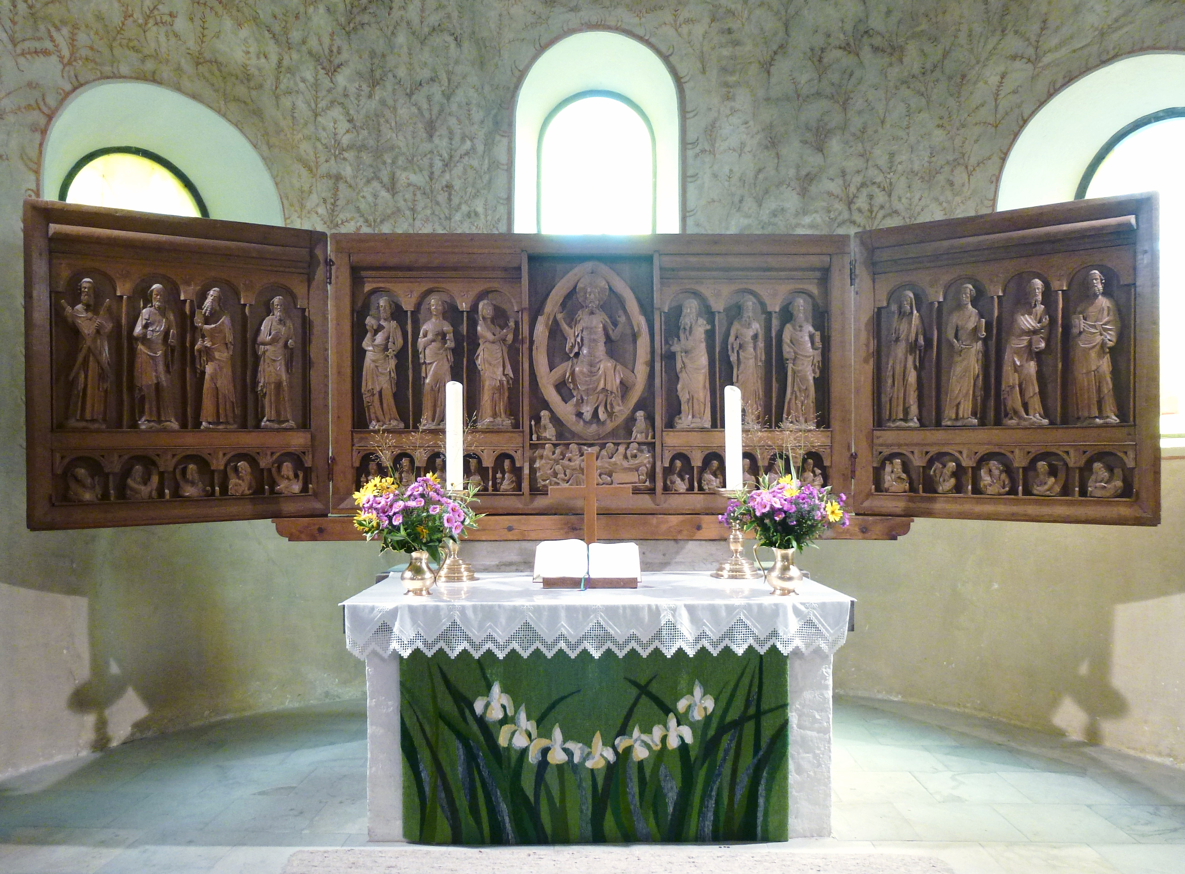 Petrikirche in Bosau, Altar